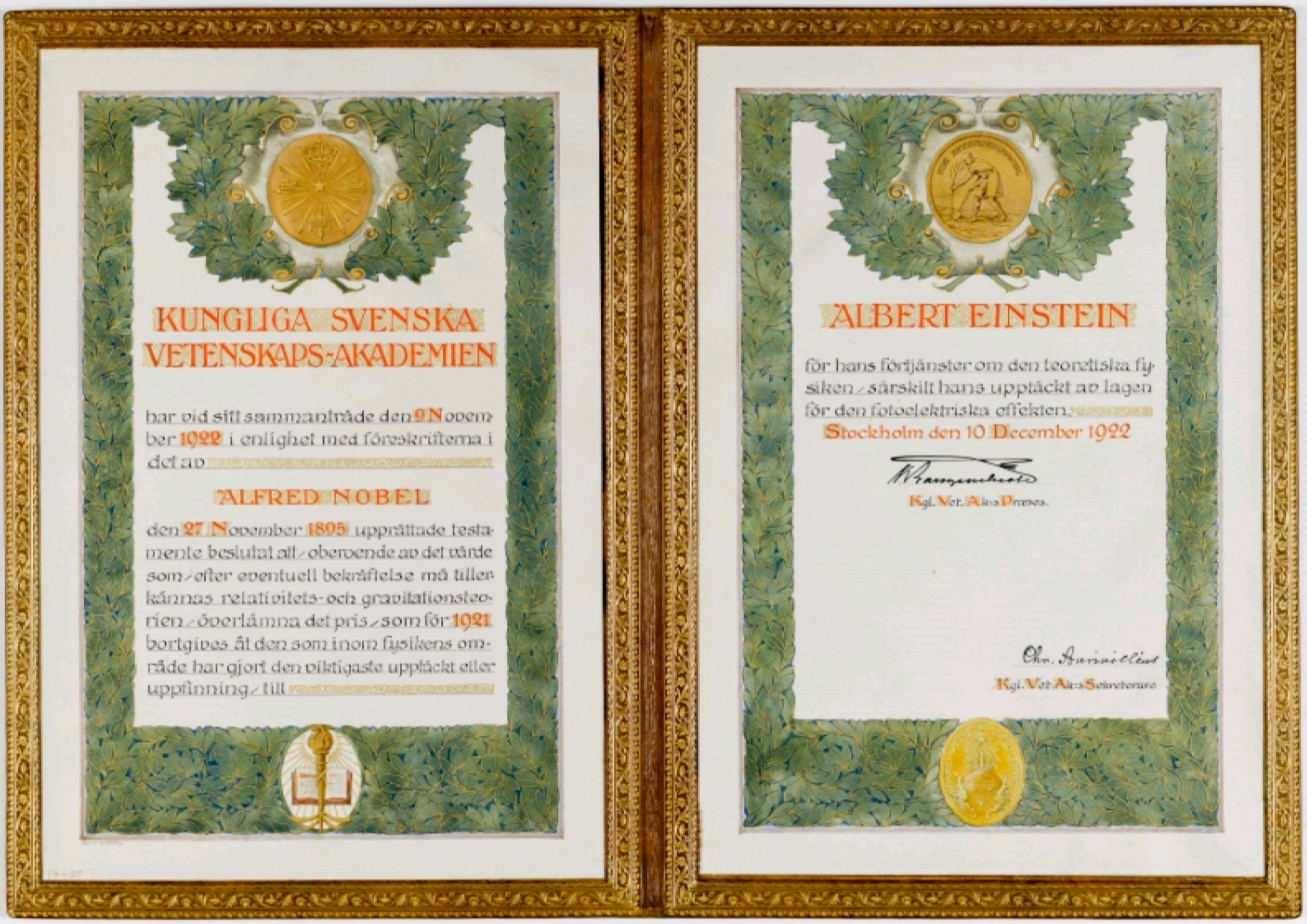 Albert Einstein Nobel Preis 1921, überreicht 1922